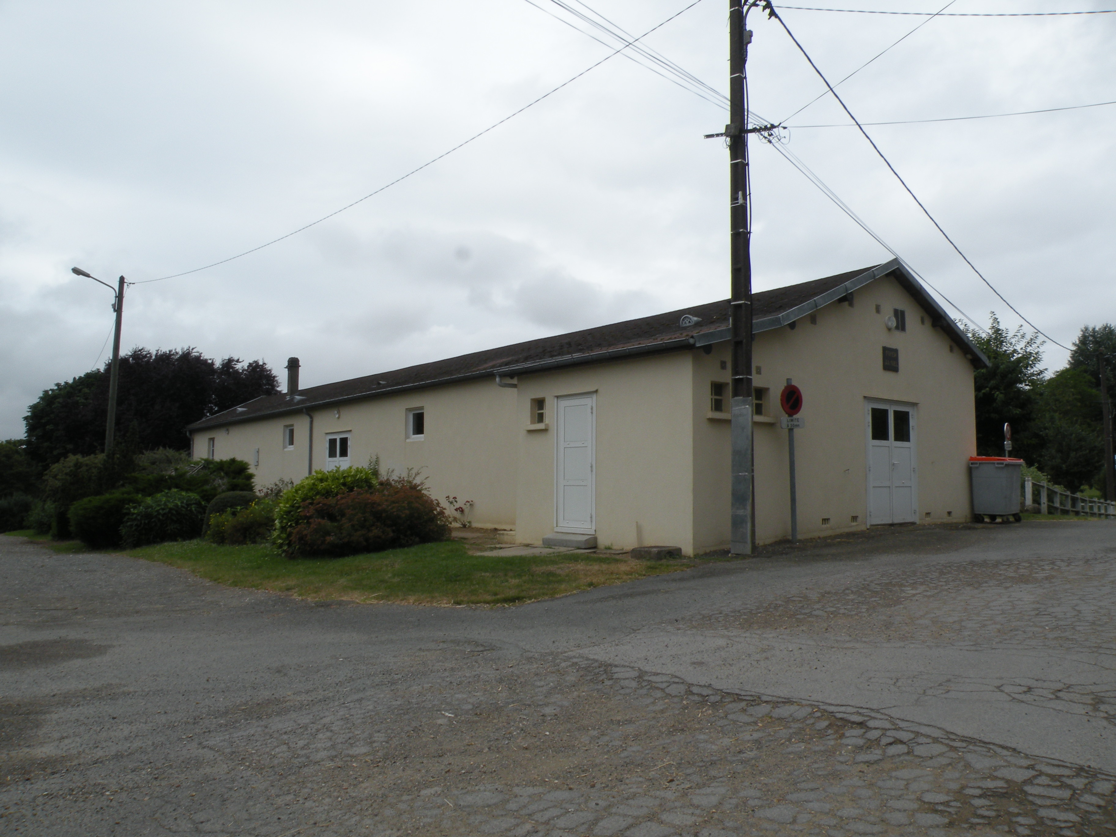 Hanvoile